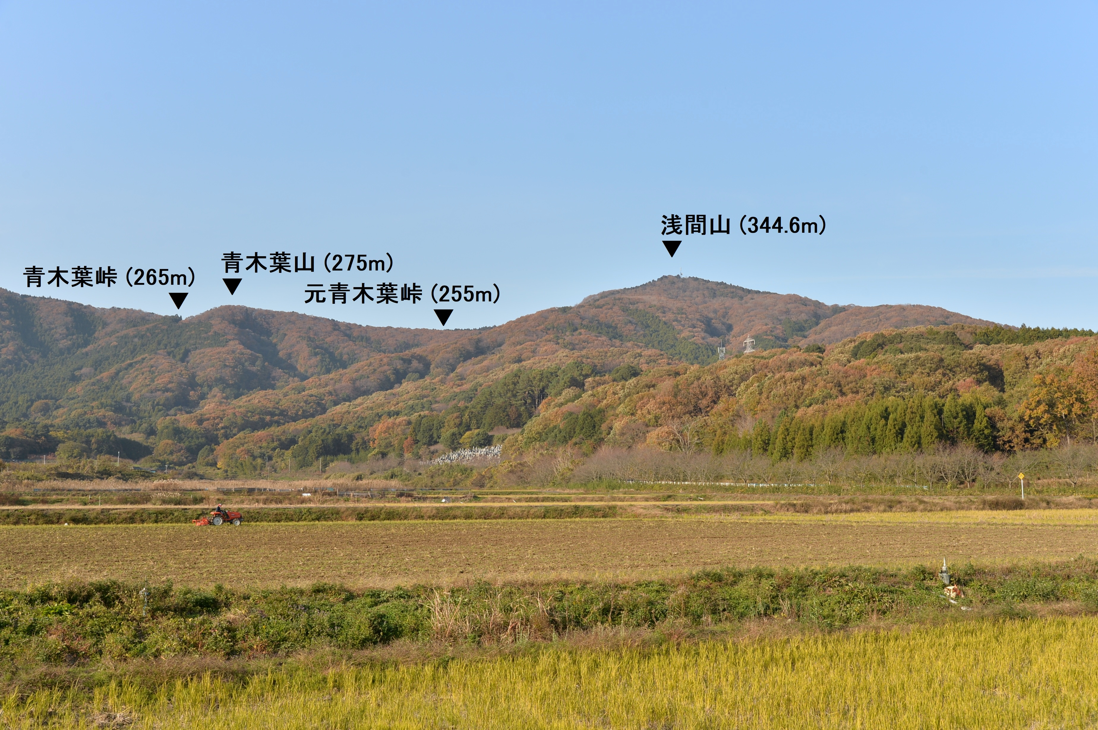 筑波連山（筑波山塊）東部にある浅間山（茨城県）。茨城県かすみがうら市上佐谷から展望した風景。 Nikon Df